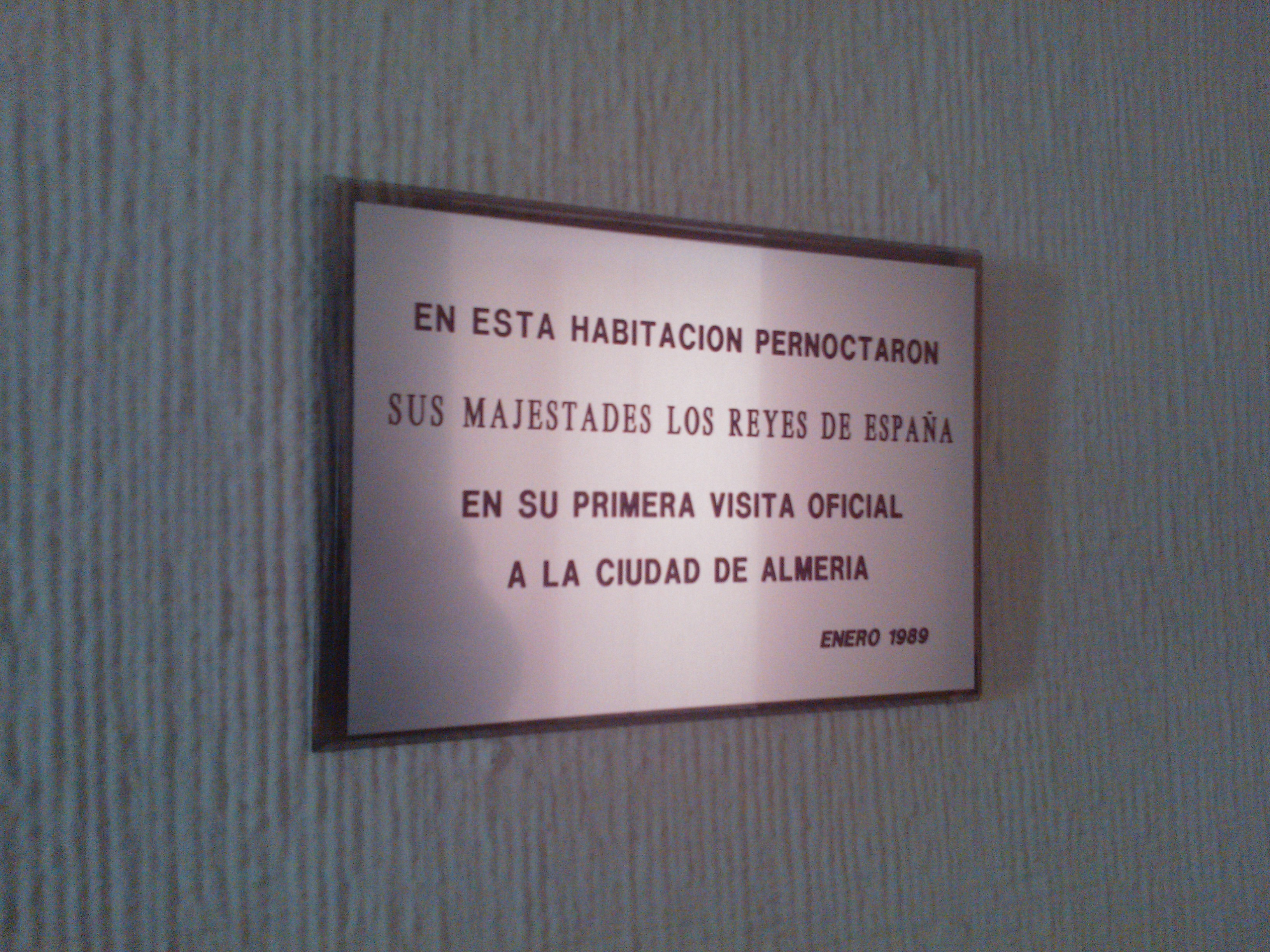 Placa dedicada a SSMM los Reyes de España en el Gran Hotel Almería